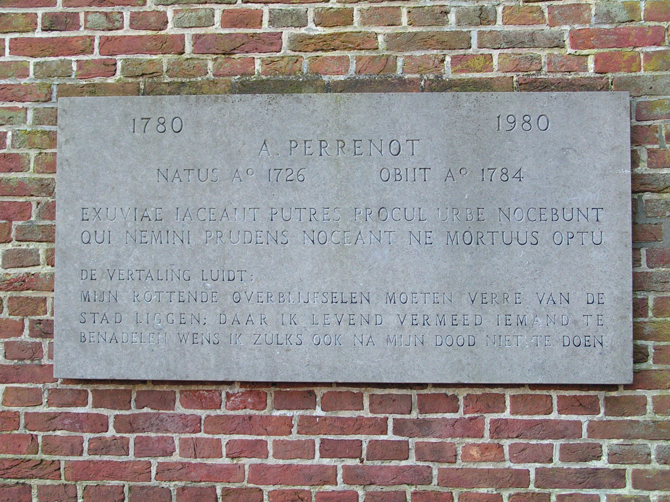 Gevelsteen ter herinnering aan Abraham Perrenot (1726-1784) op begraafplaats Ter Navolging in Scheveningen.